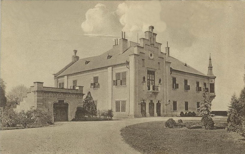 Uioara de Sus, Castelul Teleki Adam (ilustrată, 1915)